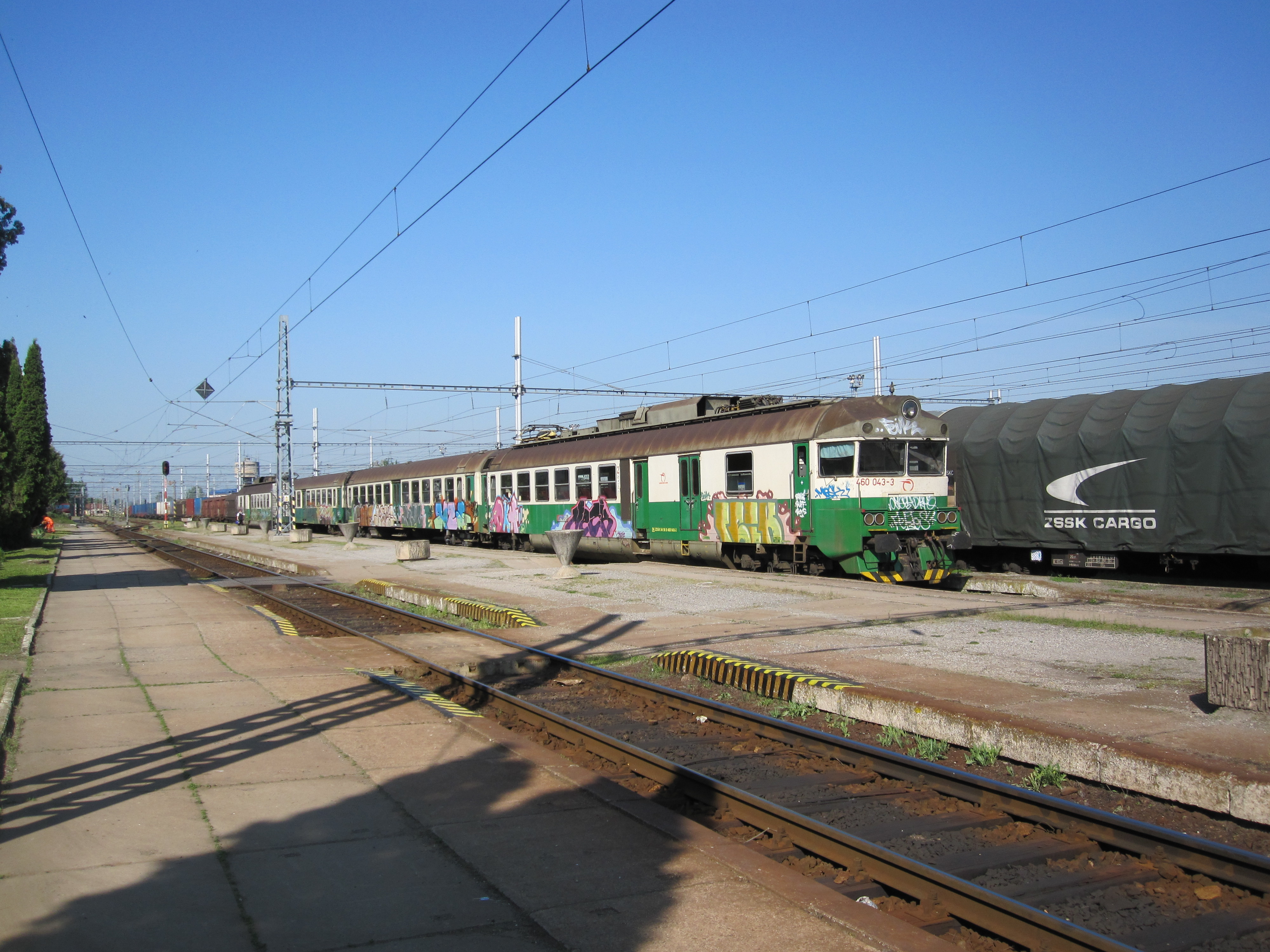 Elektrická jednotka 460.043/044 Železniční společnosti Slovensko, Čierna nad Tisou